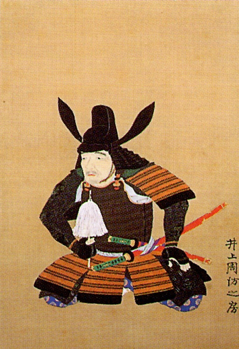 井上之房の肖像。